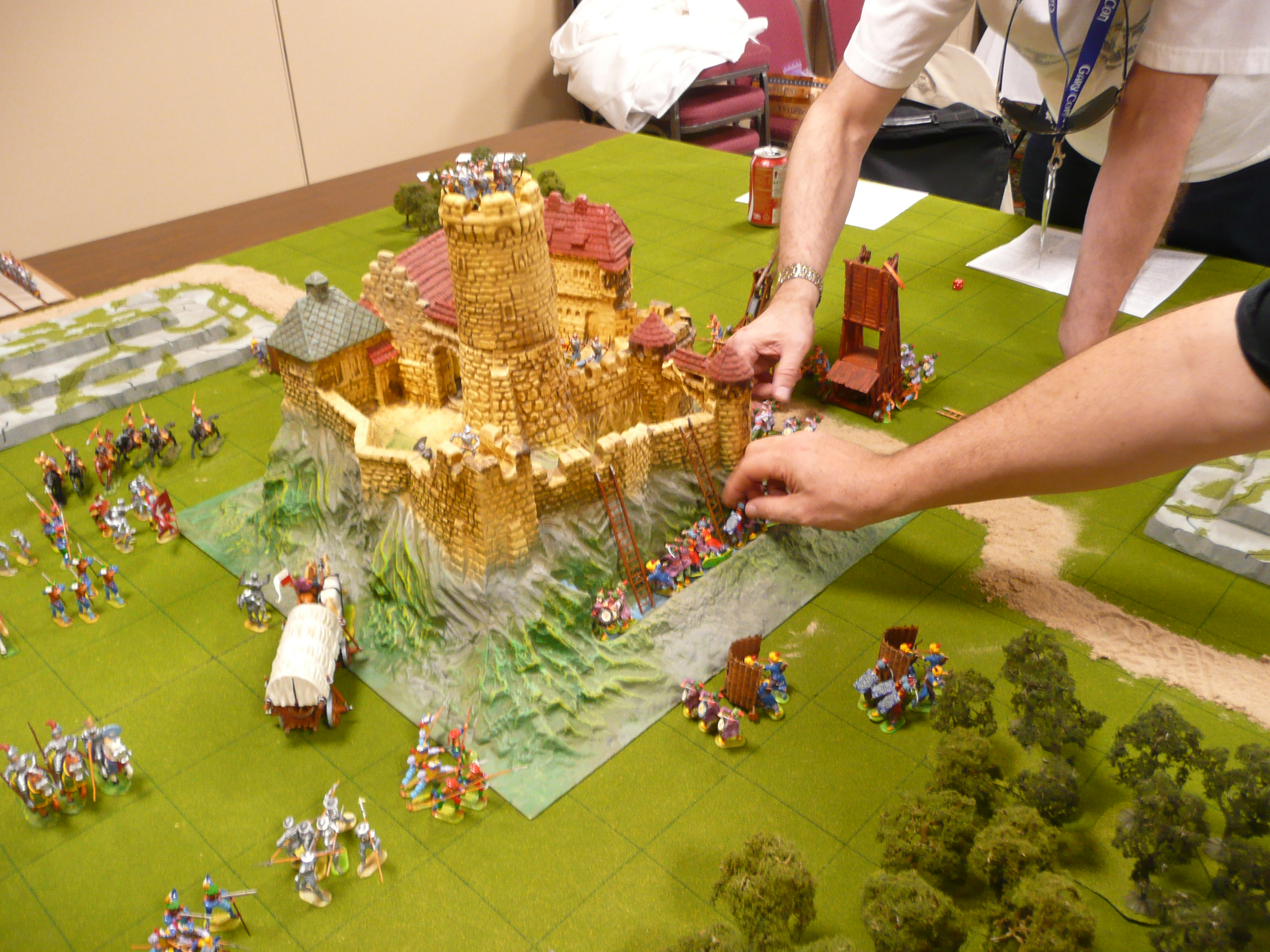 Siege of Bodenburg